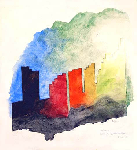 9. symfonie od Antona Brucknera